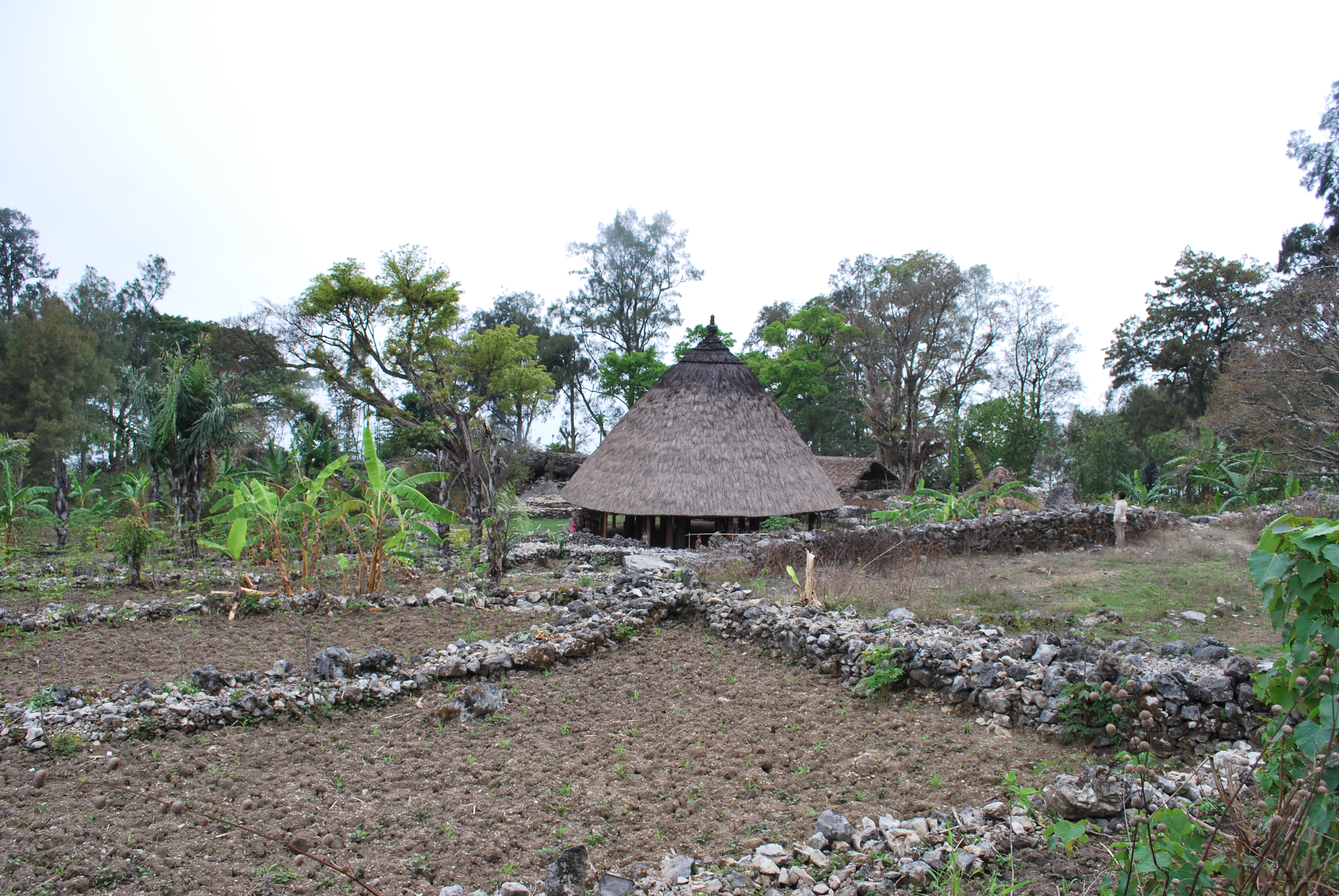 Fad Locar, Hautio, Suco Nuno-Mogue, Subdistrikt Hatu-Builico, Distrikt Ainaro